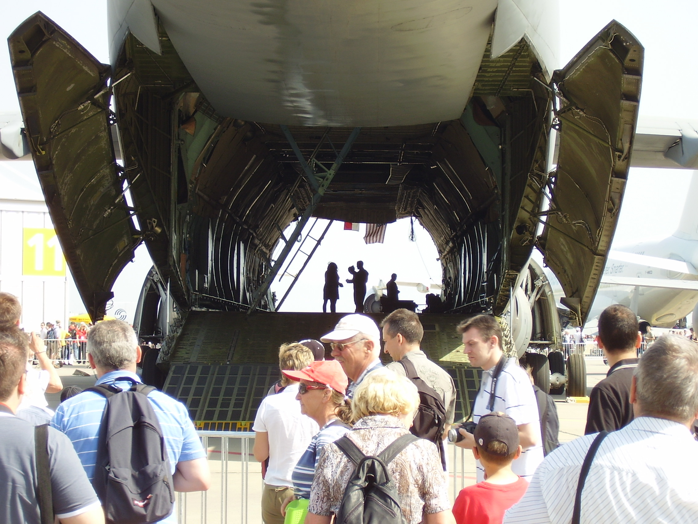 ILA 2008